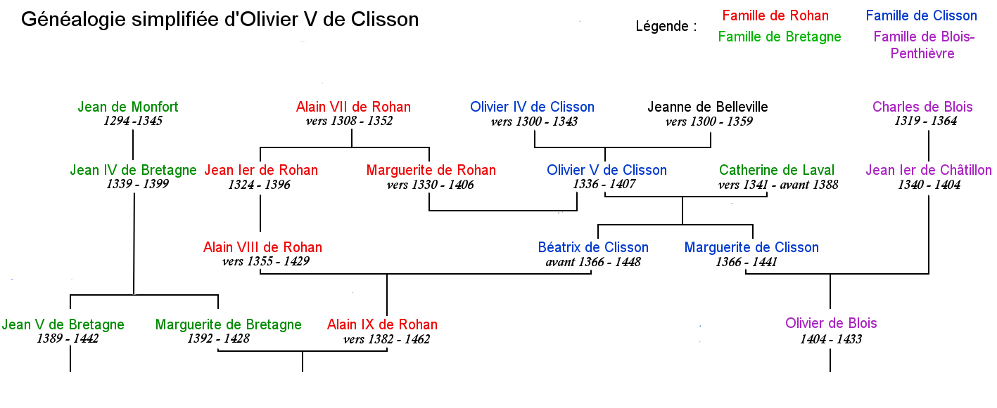 Schéma généalogique simplifié d'Olivier V de Clisson